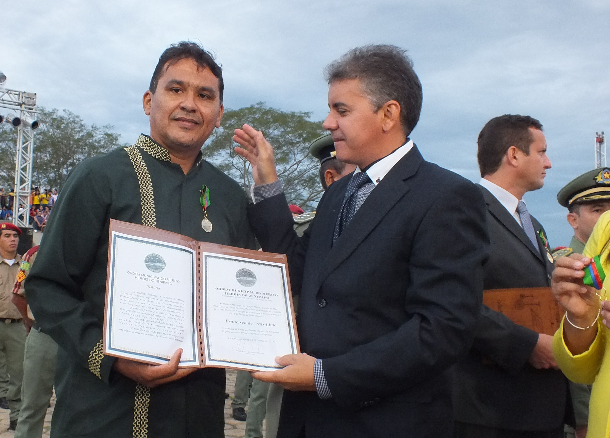 Prefeito de Campo Maior fazendo entrega da Medalha do Mérito Heróis do Jenipapo.